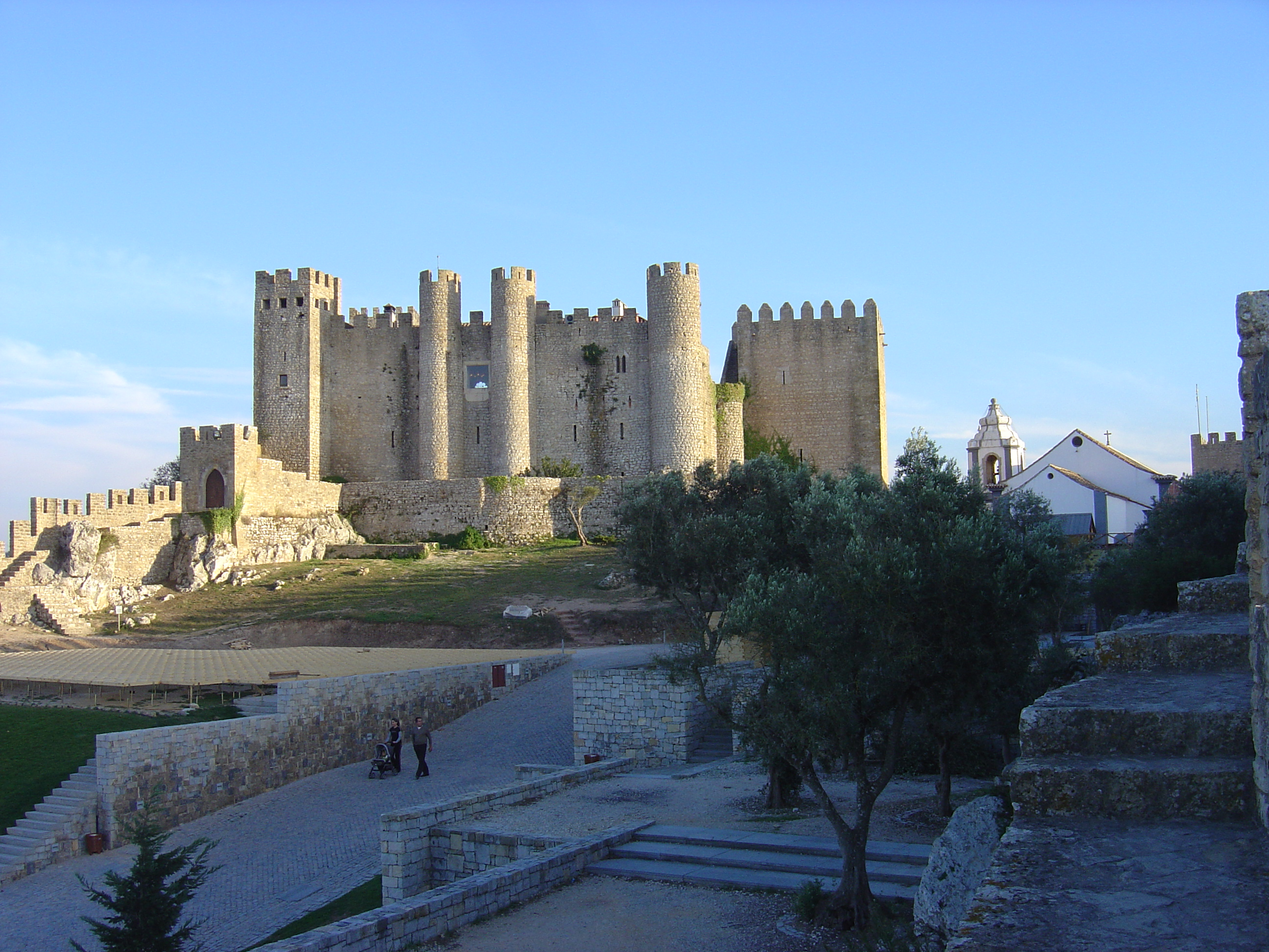 Óbidos, Portugal